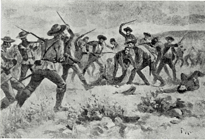 Publicado en "Blanco y Negro" (Madrid, 1 de julio de 1895).